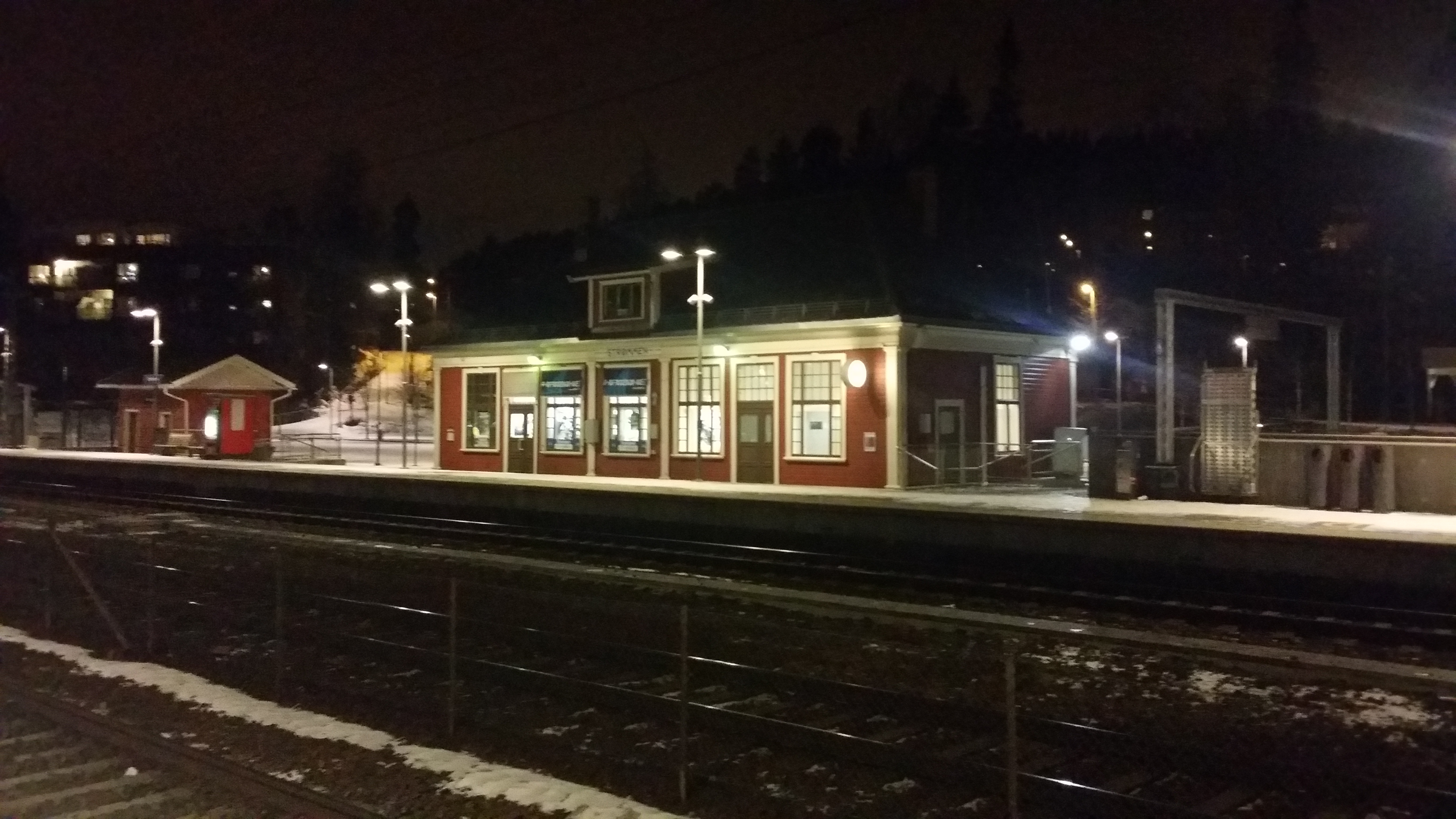 Vinterkveld. Strømmen stasjon.